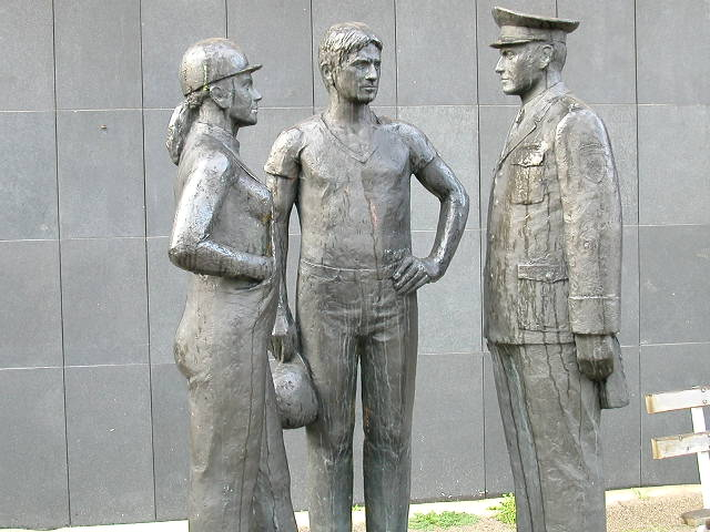 Denkmal mit Arbeitern und Volkspolizist in Uniform vor dem Informations- und Dokumentationszentrum der BStU (ehemaliges Archiv des MfS) in Berlin (Mitte).